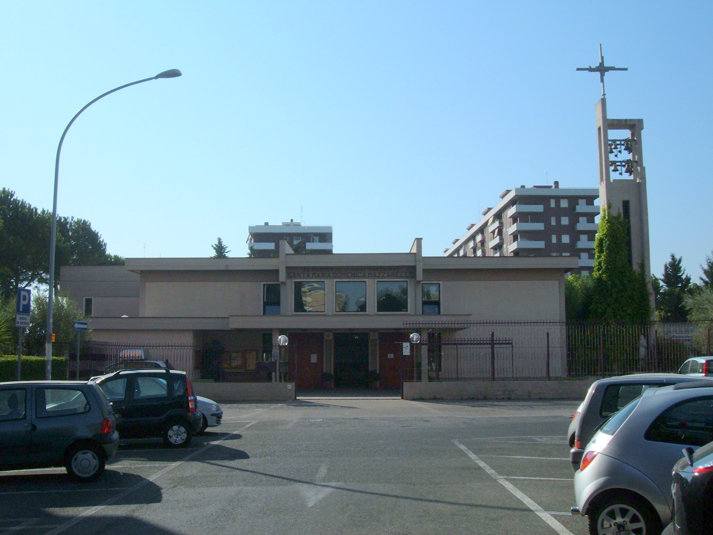 Chiesa parrocchiale di Santa Maria Domenica Mazzarello, a Roma, nel quartiere Don Bosco.